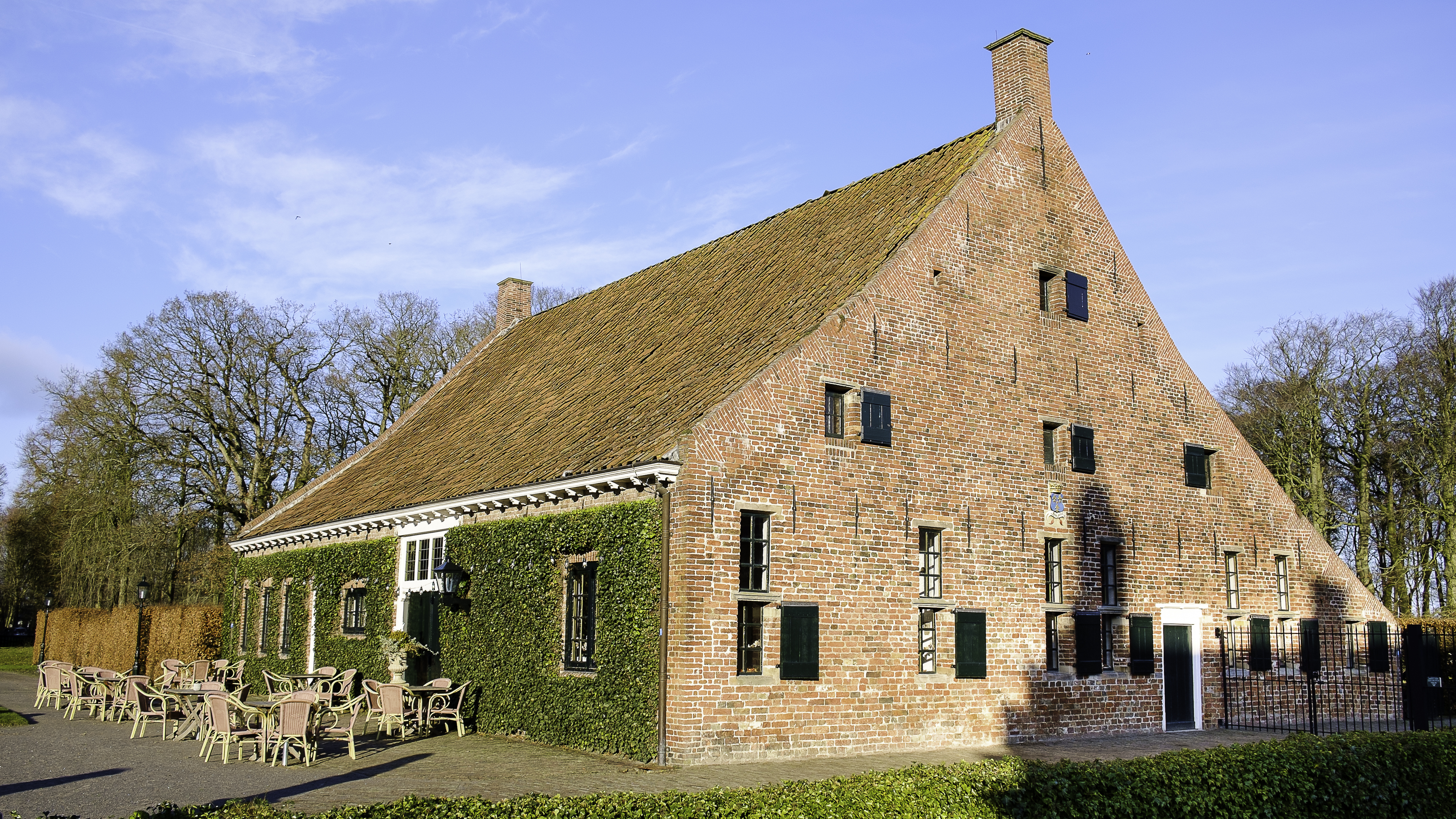 Koetshuis van de Menkemaborg